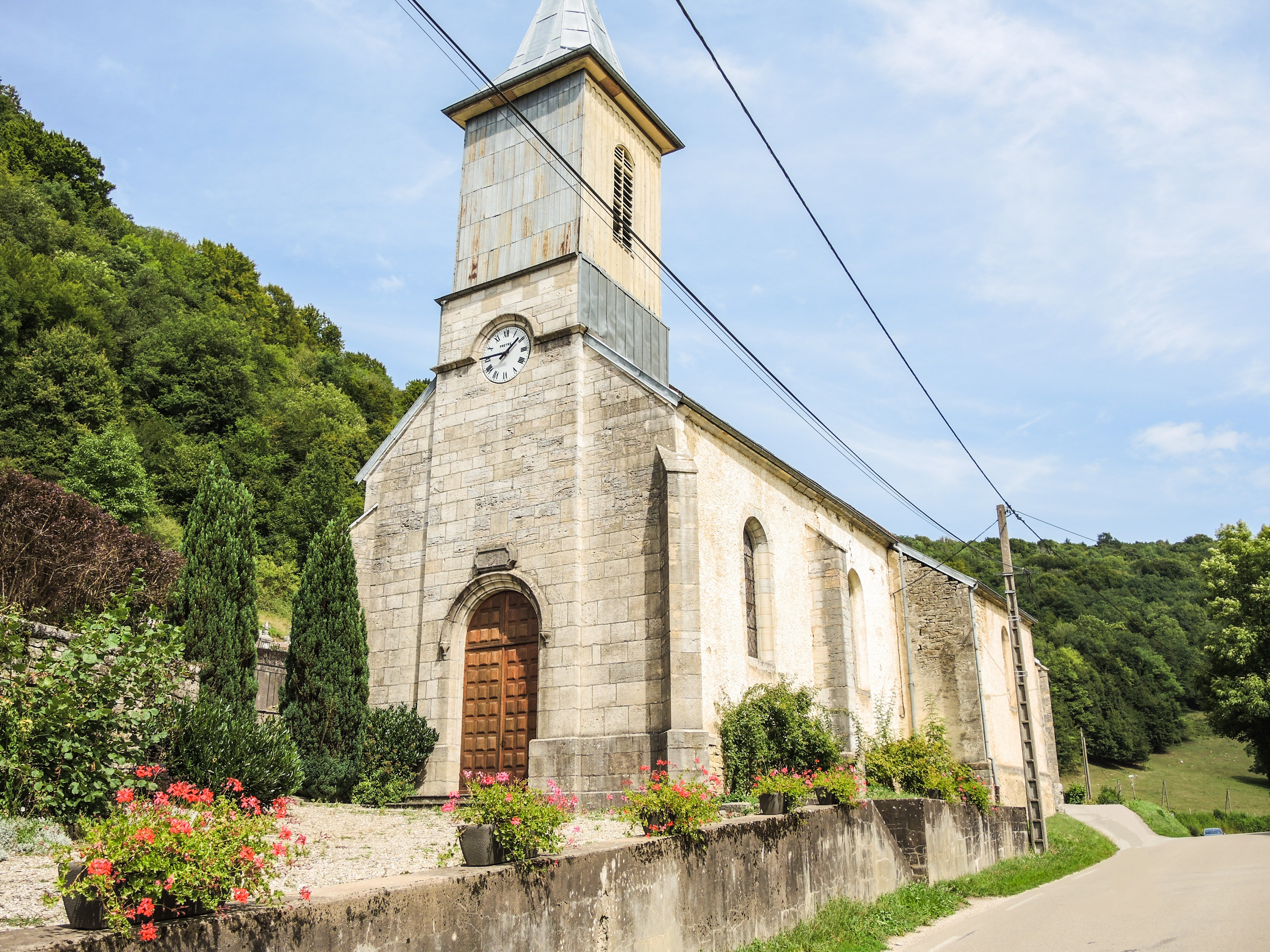 Eglise Notre-Dame de Cusance. Doubs